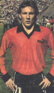 Claudio Spontón en Platense con un uniforme de edición especial que recuerda al primero utilizado por el club, está vez realizado por la marca deportiva Puma.